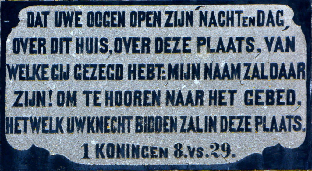 Easthim, grifformearde tsjerke 't Anker (PKN), gevelstien